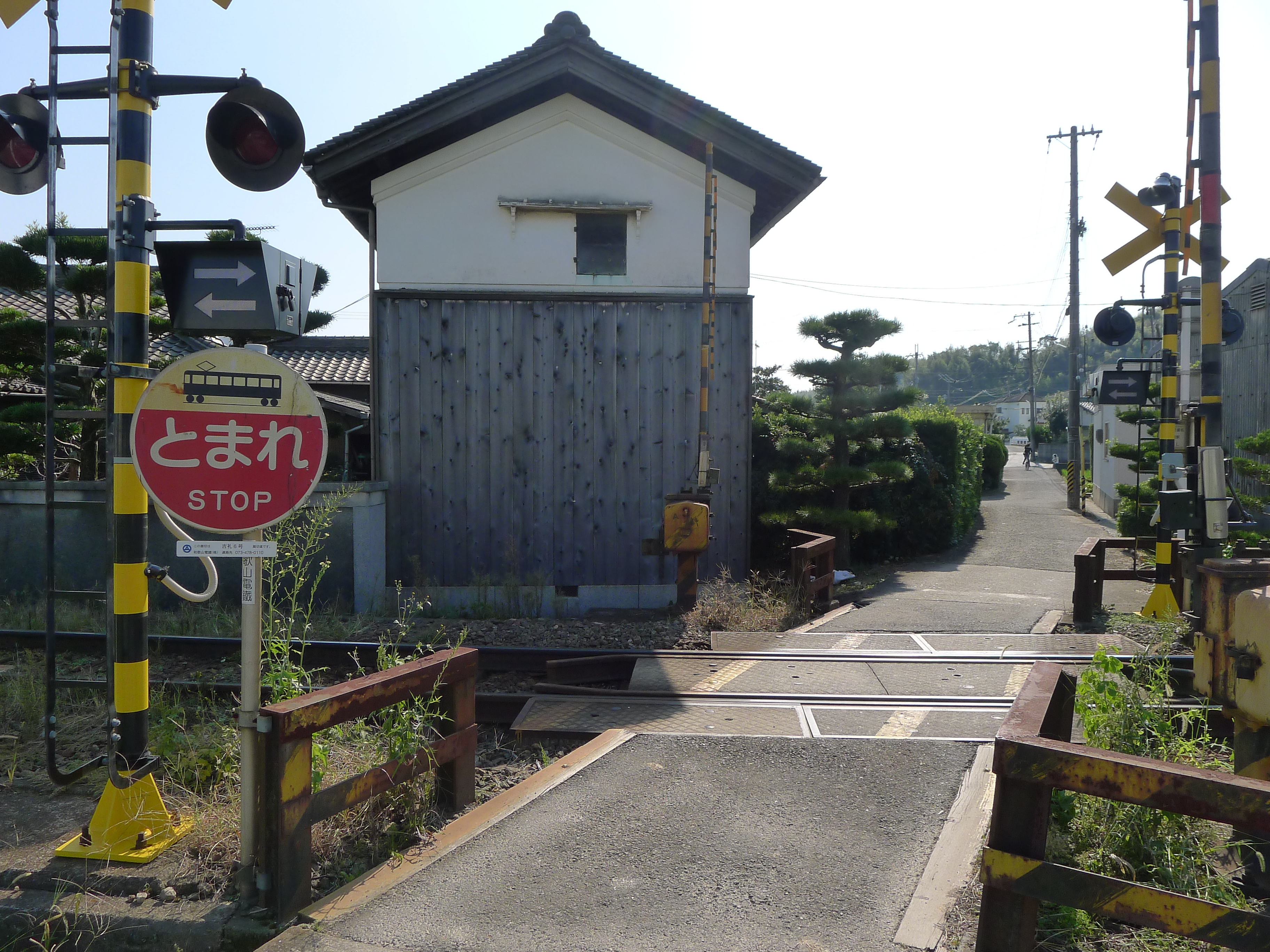 熊野古道紀伊路が通る口須佐集落（和歌山県和歌山市）。和歌山電鉄貴志川線に面している。